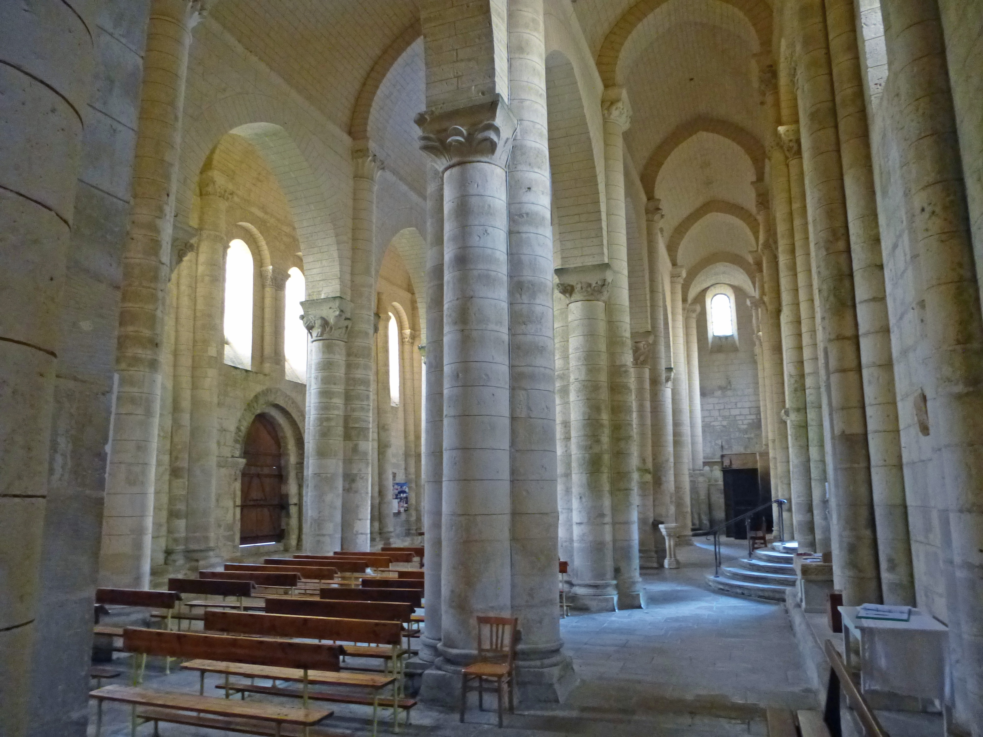 Construit entre 11et 12 ème siècle; sur la route de Compostelle